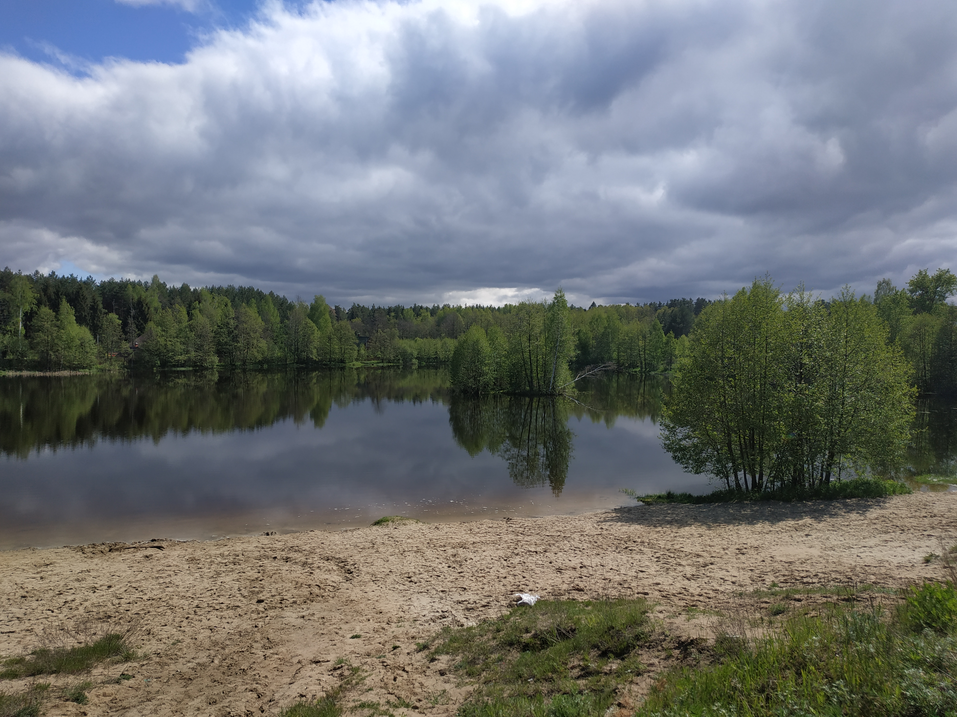 Пласкинино Раменский округ